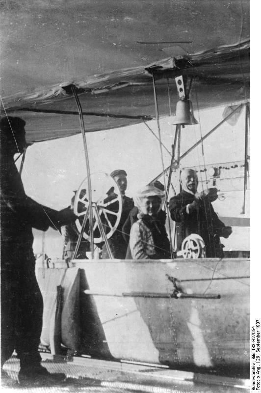 Zentralbild Graf Zeppelin mit seiner Tochter und Ingenieur Dürr in der Gondel eines Luftschiffes. 32881-28